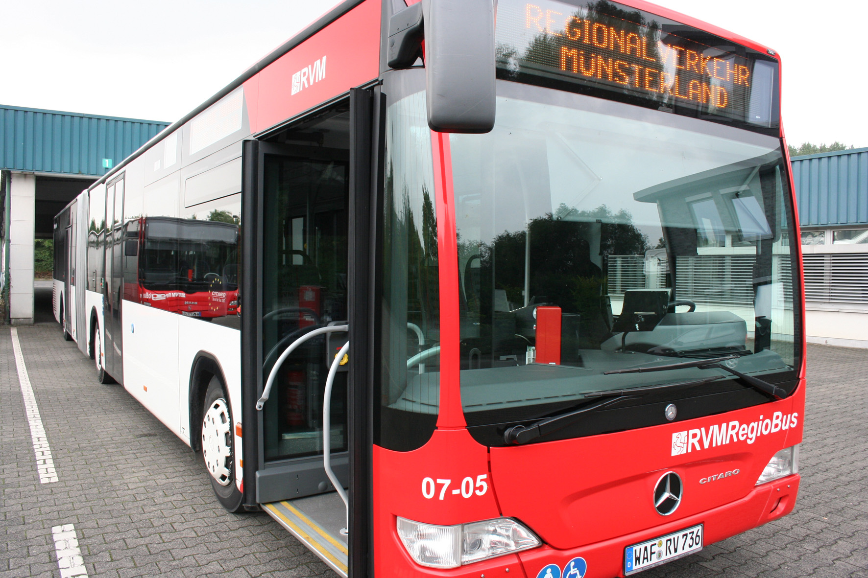 Die Modernen Regiobusse der RVM sind Niederflurfahrzeuge